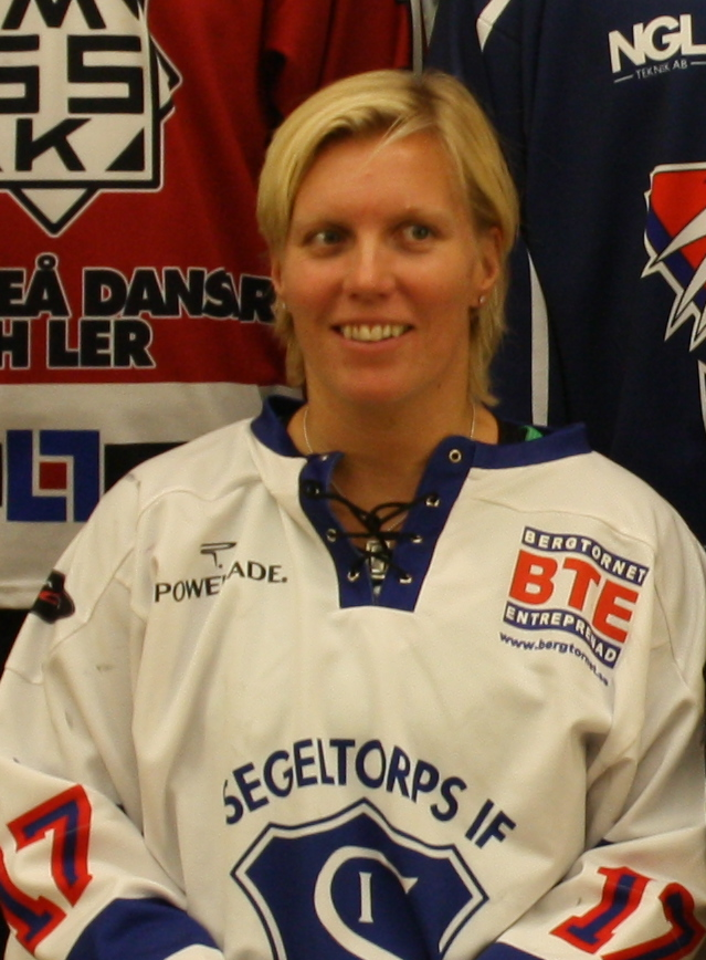 Tränarna för lagen i Riksserien 2011/12 vid upptaktsträffen. Ylva Lindberg, Segeltorps IF, Rickard Regnell, AIK IF, Ulf Hedberg